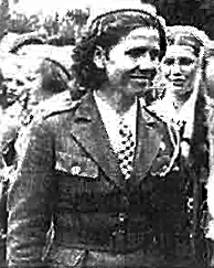 Jadwiga Harczukowa-Muszyńska z domu Stojakówna